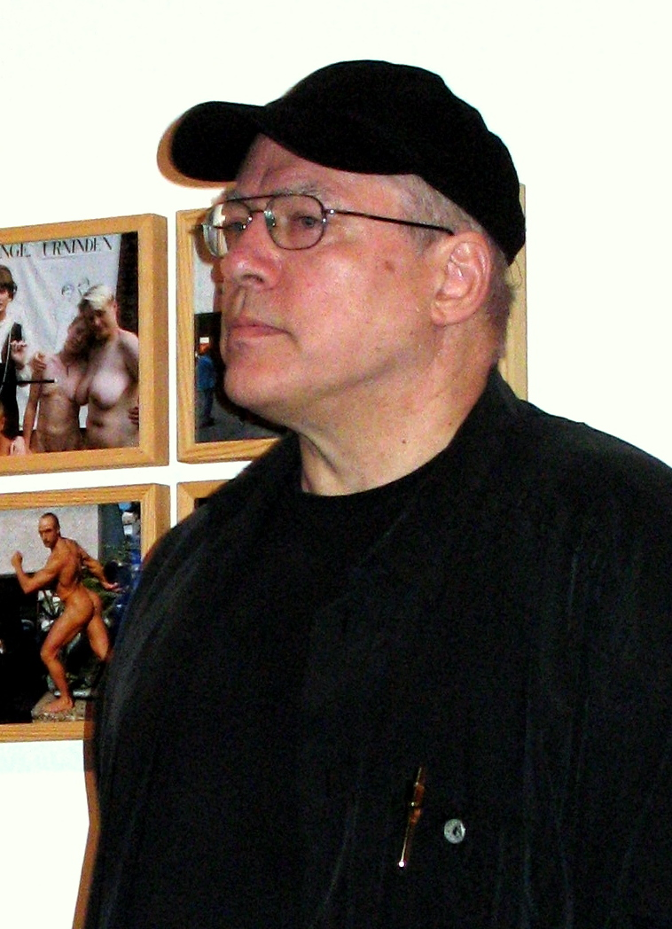 Rosa von Praunheim, Berlin. 20. Februar 2008